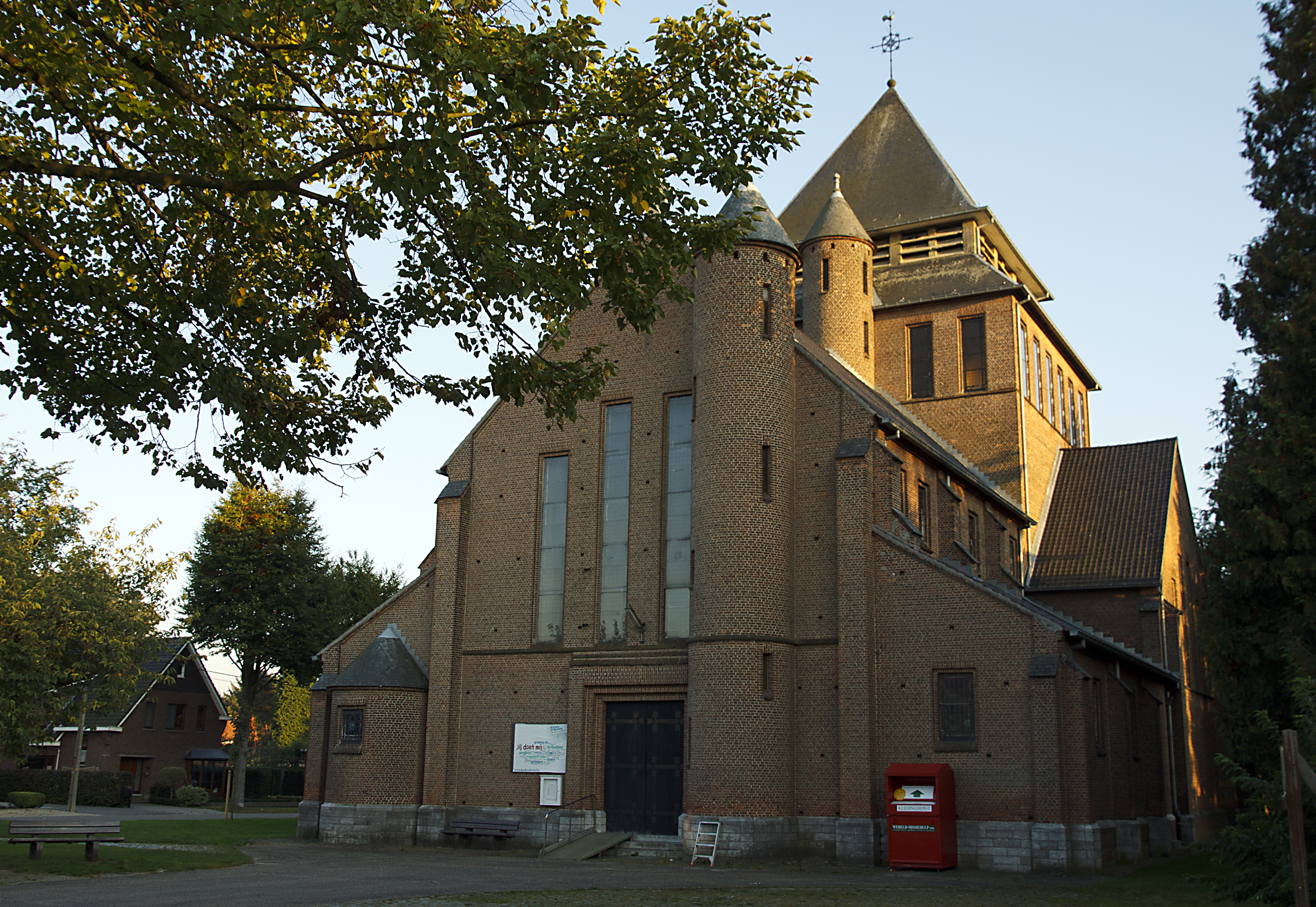 Parochiekerk Onze-Lieve-Vrouw-Onbevlekt-Ontvangen te Mol-Gompel in de provincie Antwerpen.